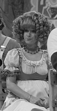 Jennifer Willems als Teun in de Nederlandse kinderserie De film van Ome Willem in 1981